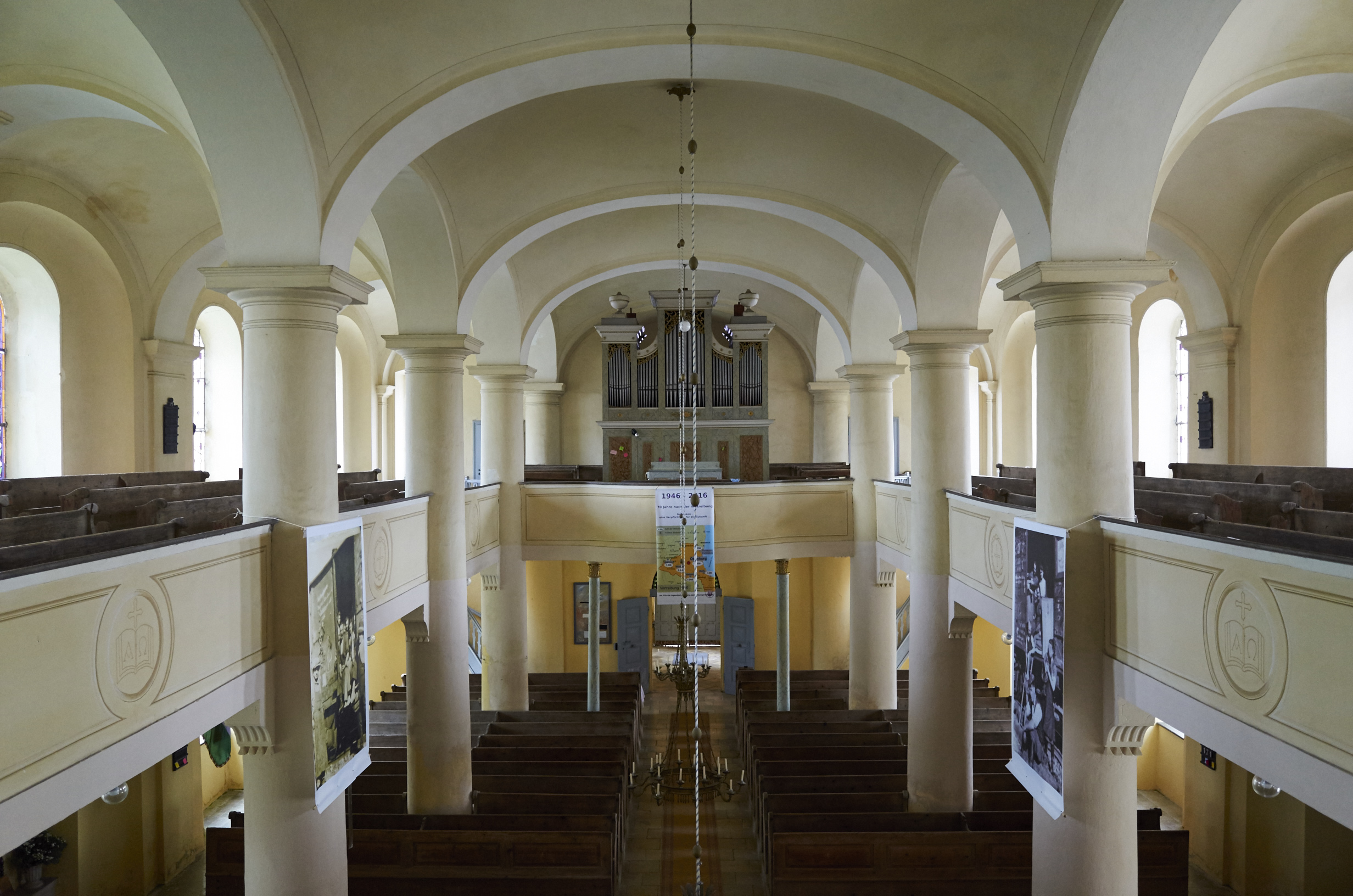 Innenaufnahme der Lutherischen Kirche Ágfalva von der Kanzel aus